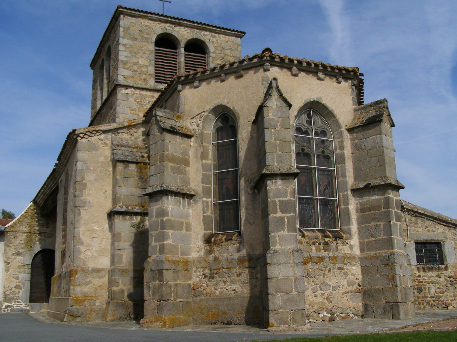 Eglise Saint Pierre (apôtre), dos